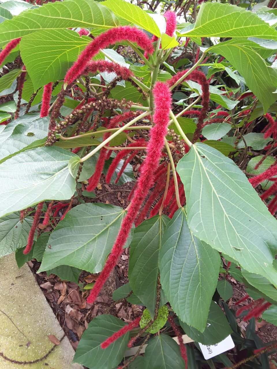 Singapura Pokok Ekor Kucing